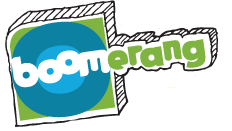 Logo 2009-2010